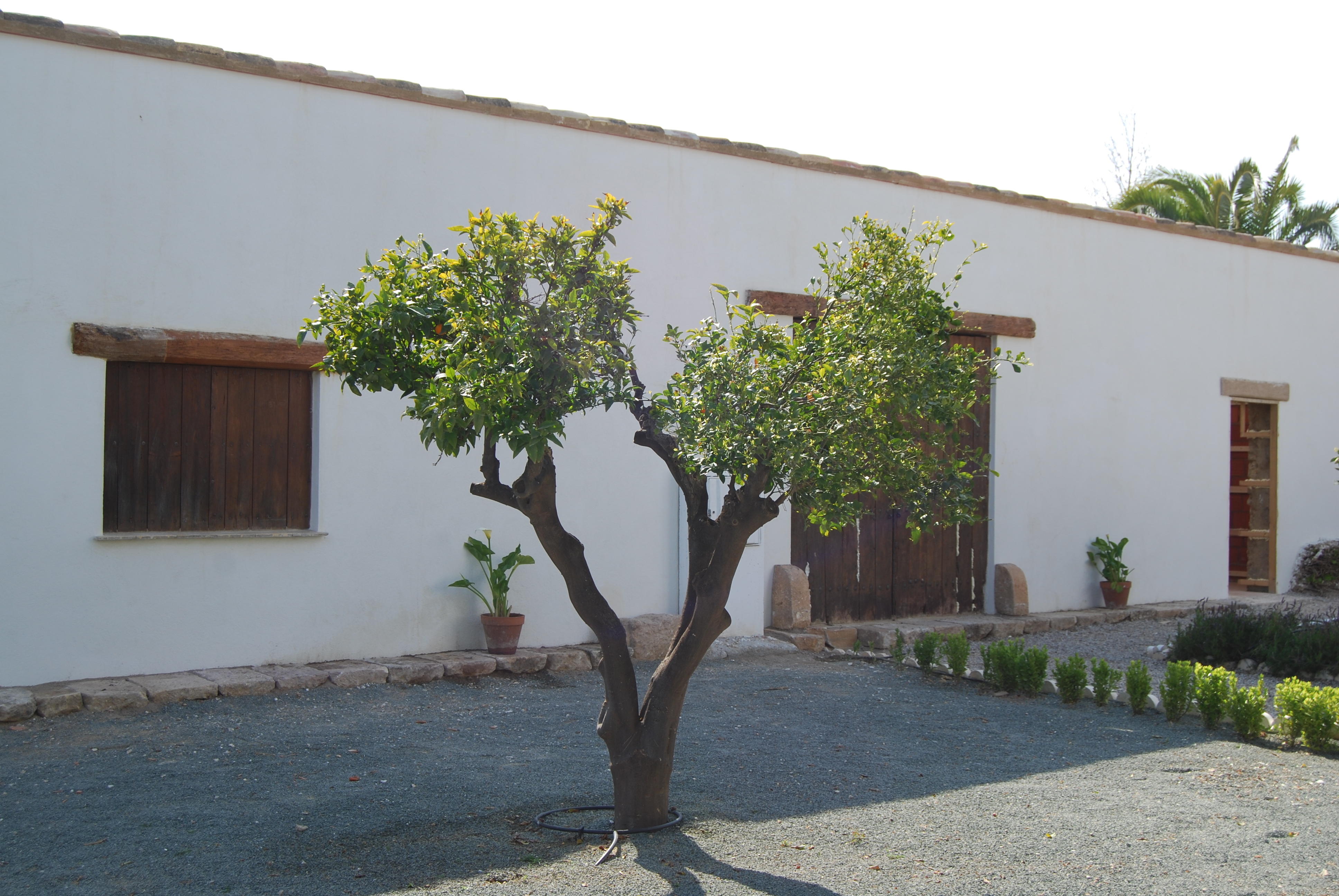 Lateral de edificio en Casa del Cura